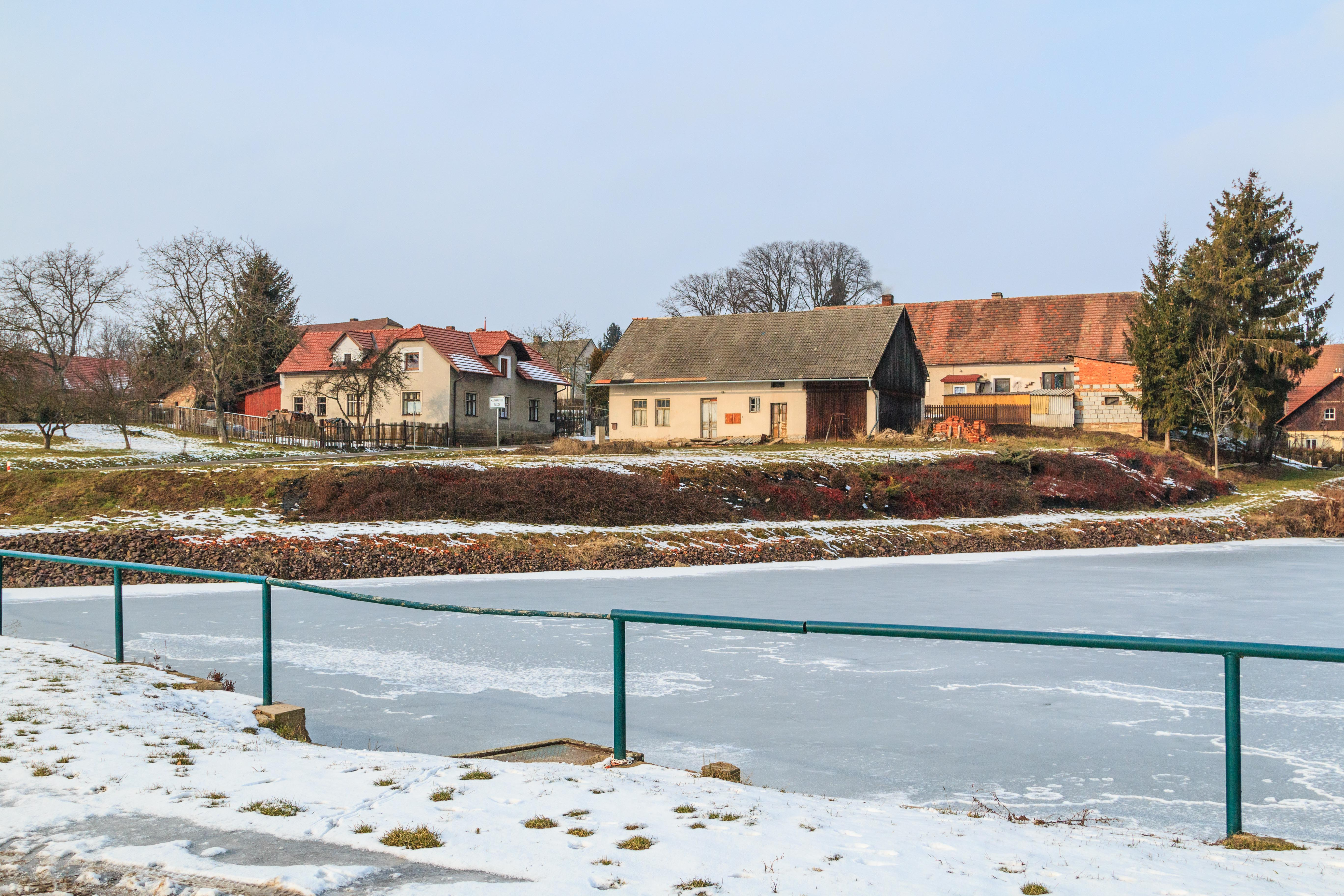 Rybník u Rakova